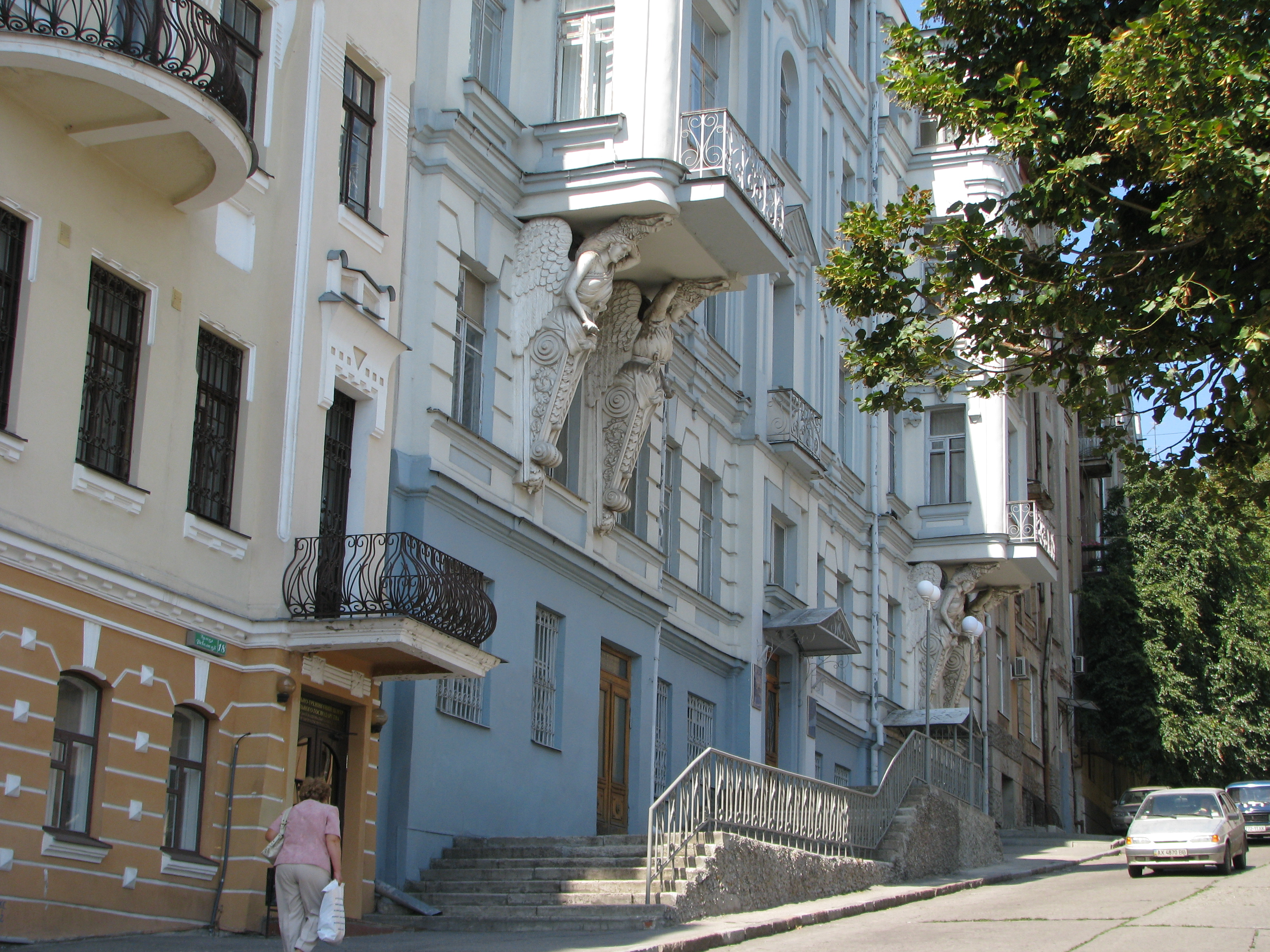 Житловий будинок, Харків, вул. Революції, 16